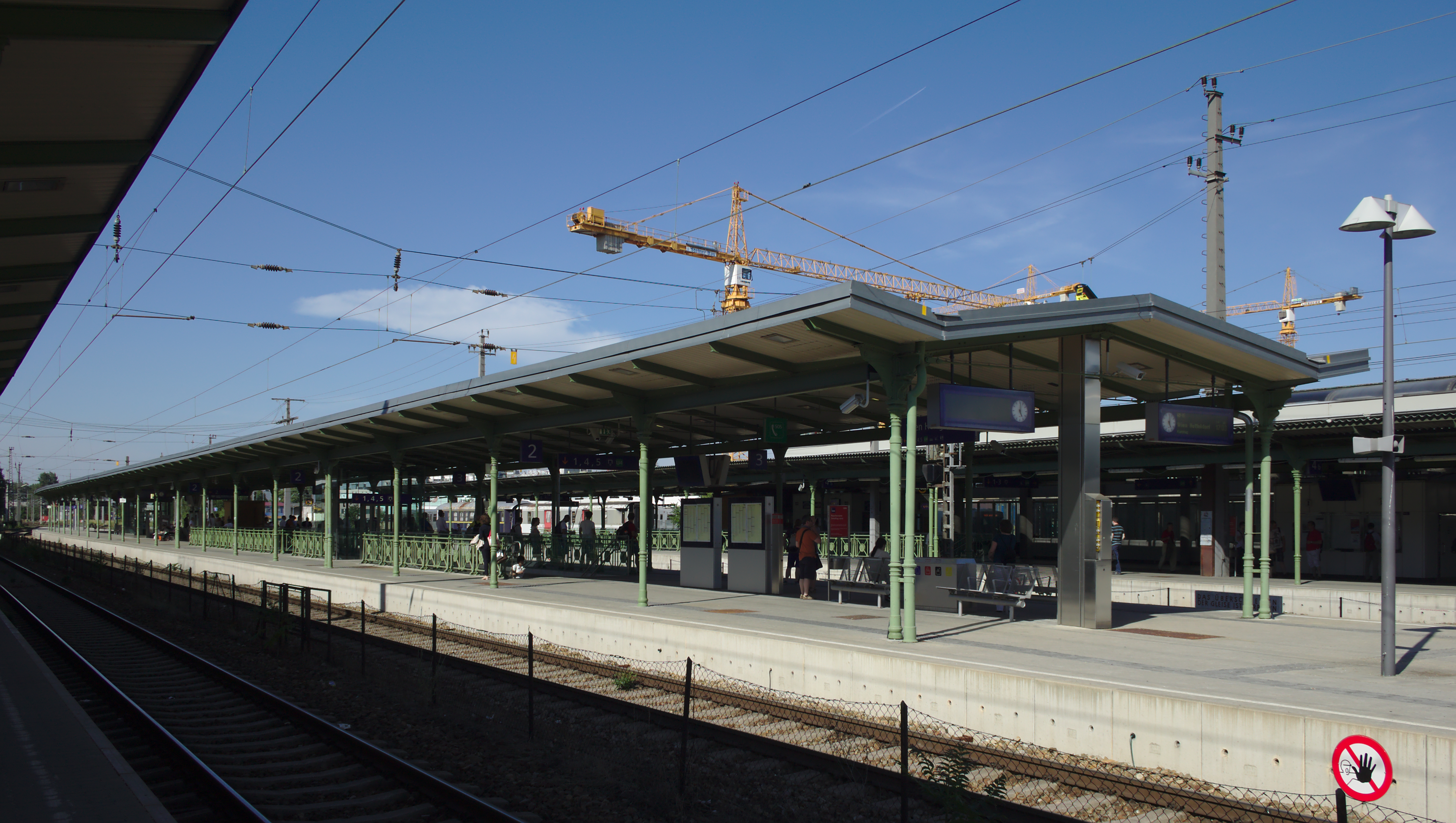 Eisenbahnstrecke, Wiener Vorortelinie - Teilbereich Heiligenstadt mit Station Heiligenstadt